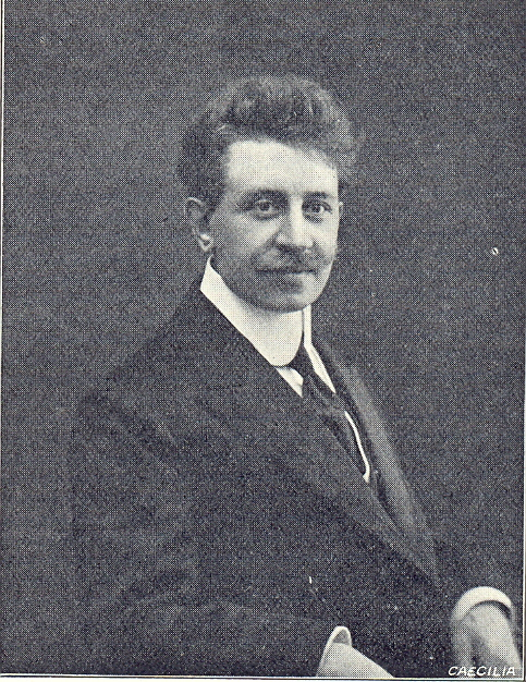 De Nederlandse dirigent Kor Kuiler (1877-1951), ongeveer 1912